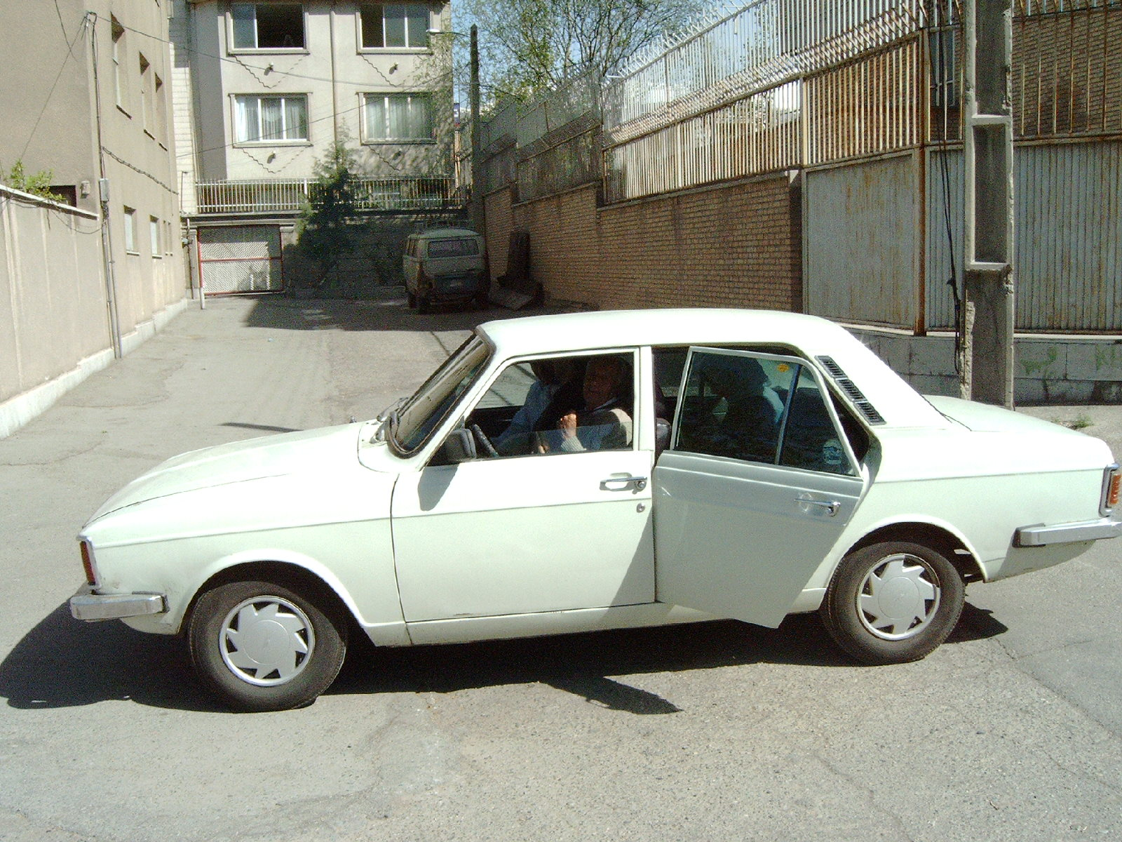 Paykan March 2005